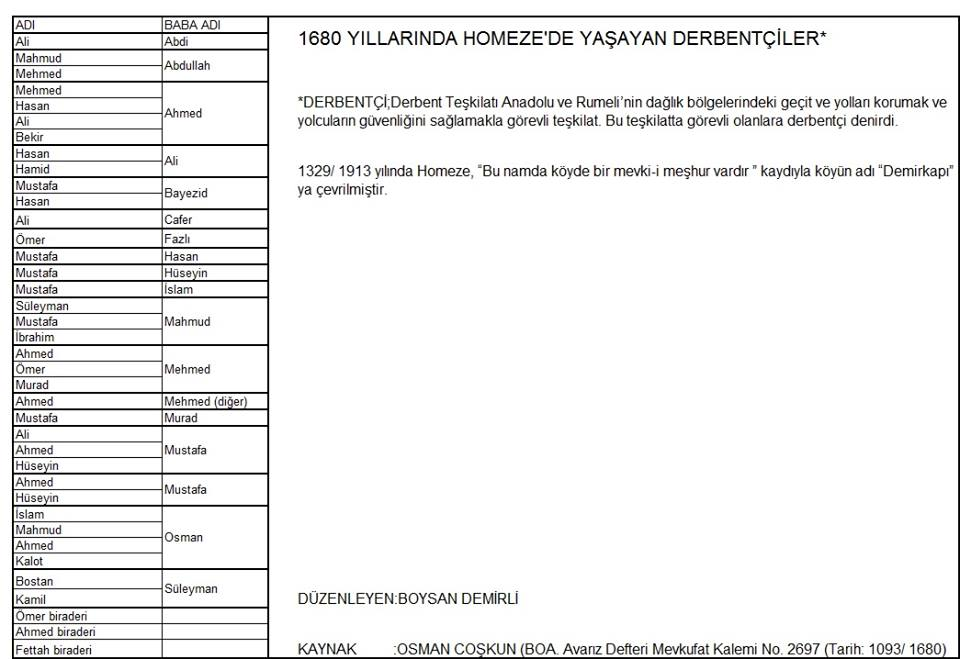 Homezeli Derbentçiler